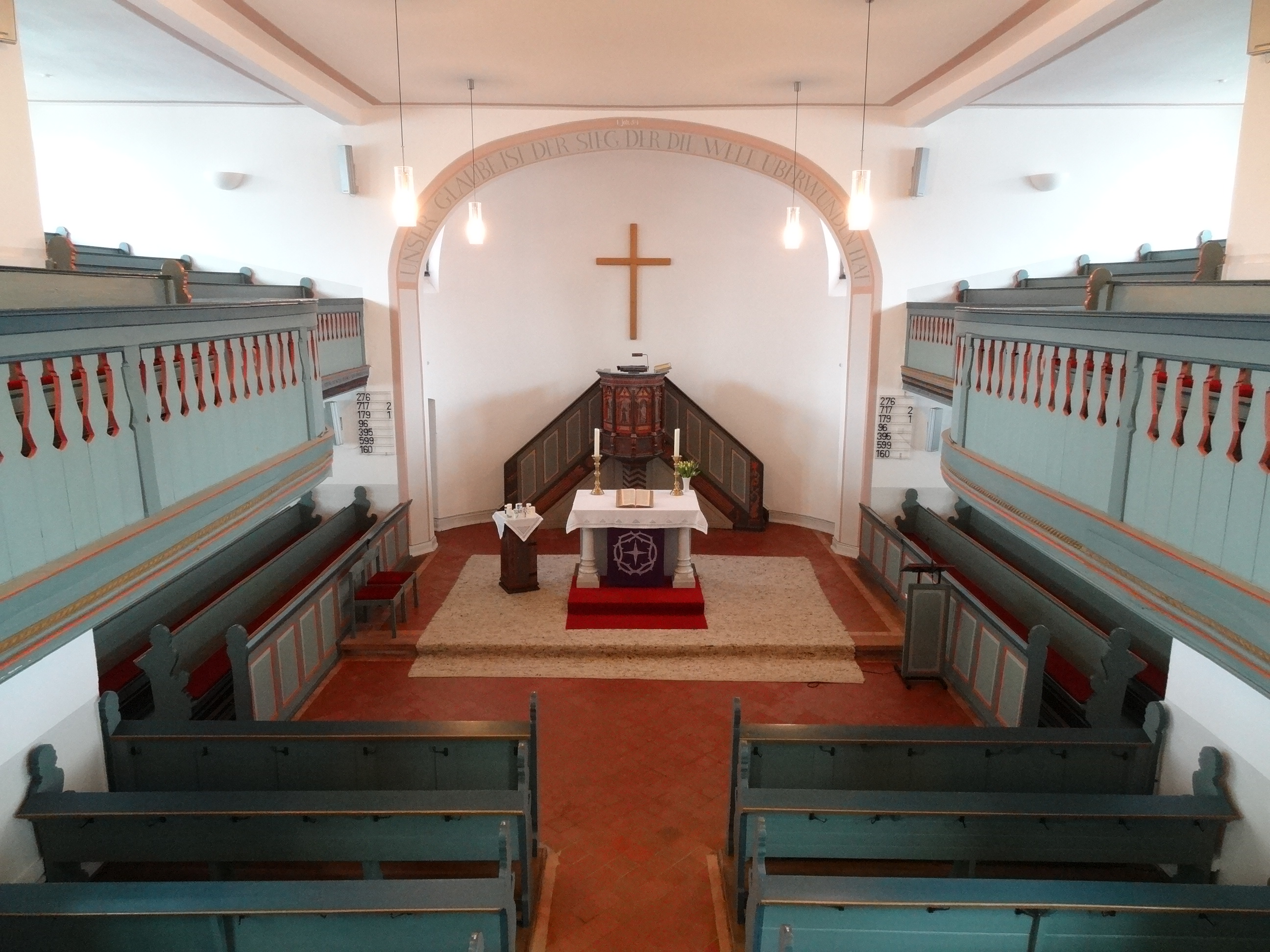 Evangelische Kirche Hochelheim